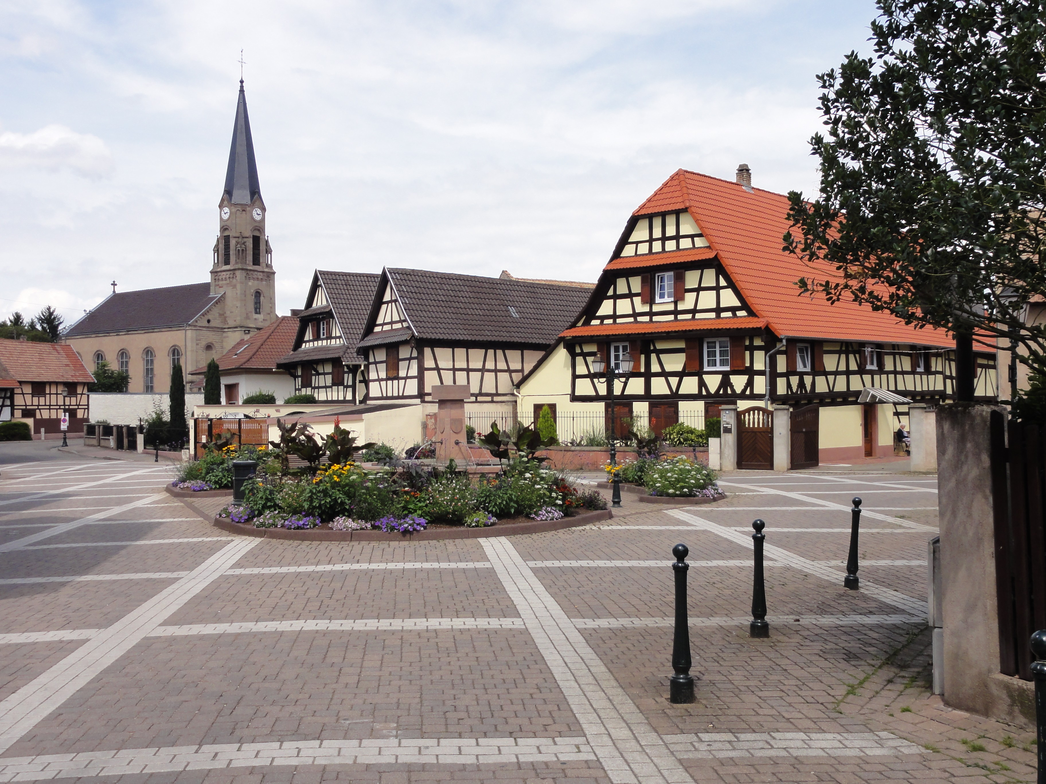 Alsace, Bas-Rhin, Eckbolsheim, Ferme, 16 rue du milieu: .